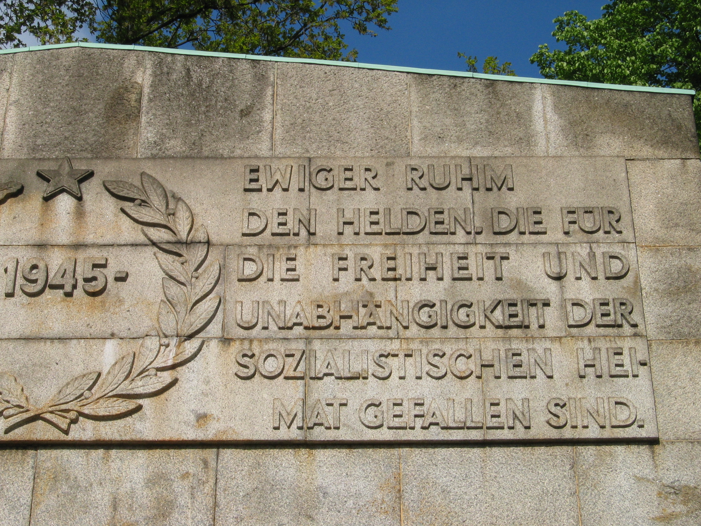 Berlin Treptow Sowjetisches Ehrenmal Überschrift Tor